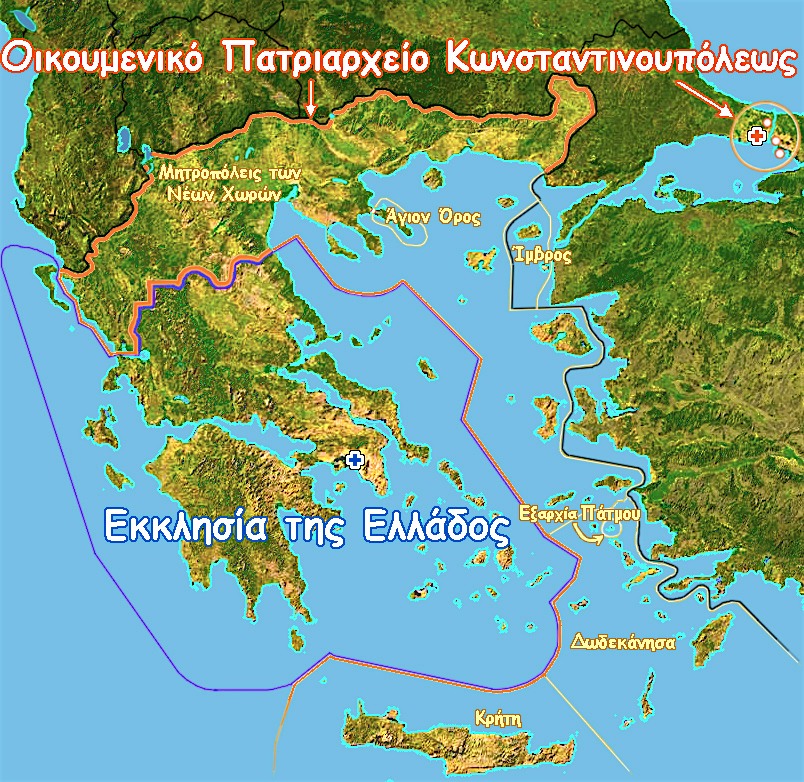 Εκκλησίας της Ελλάδος